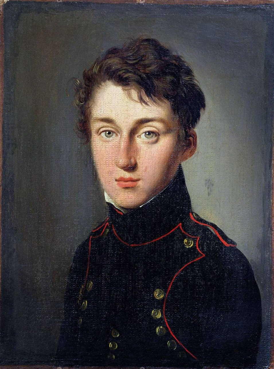 Sadi Carnot with the student’s uniform of the École Polytechnique (Paris)